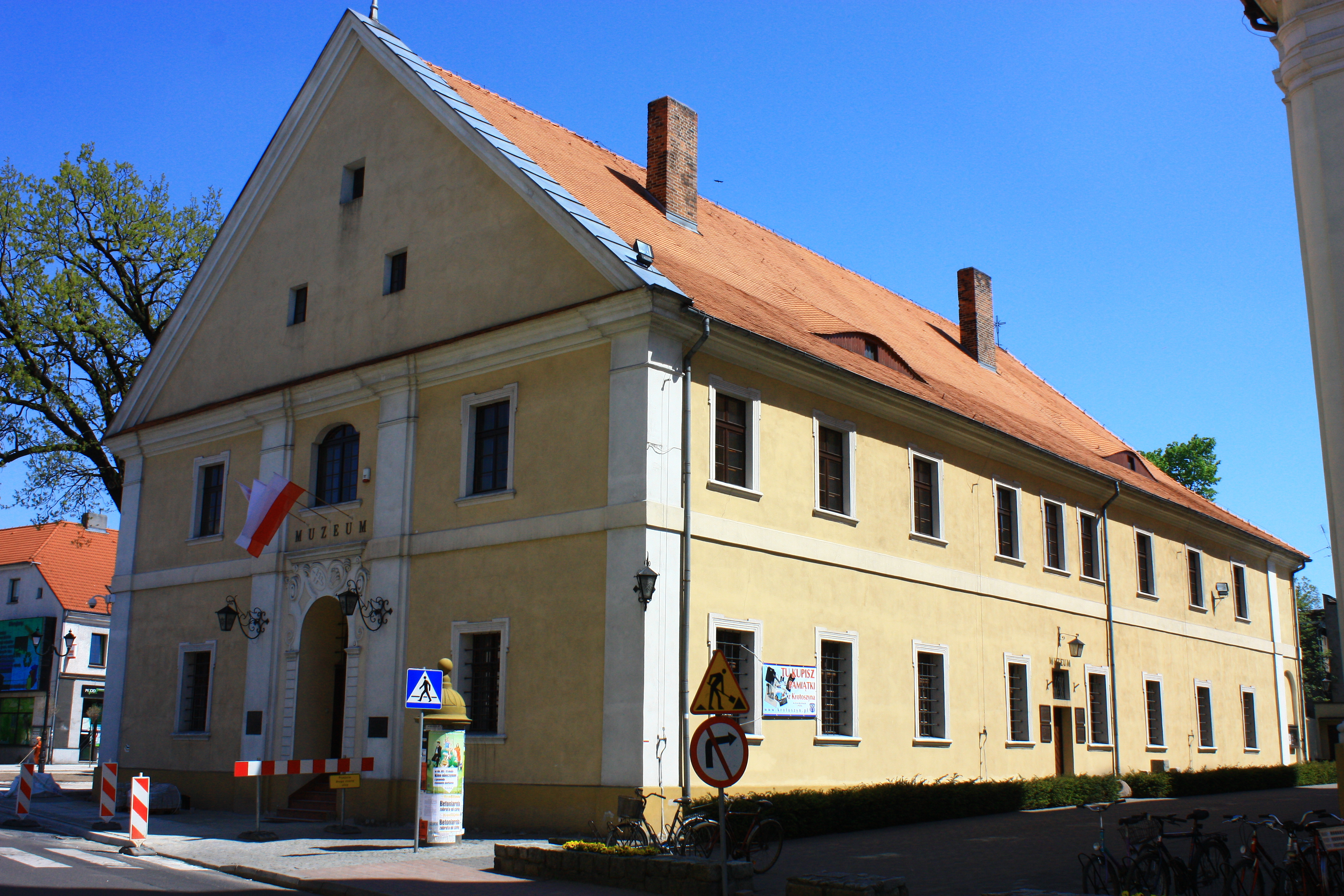 Krotoszyn, klasztor, ob. muzeum, 1733